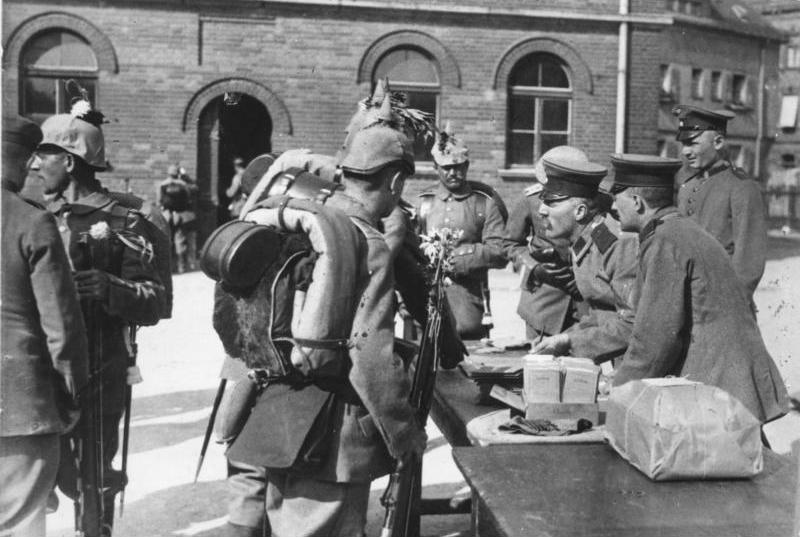 Berlin, Erster Sold nach der Mobilmachung Scherl Bilderdienst: I. Weltkrieg 1914-1918 Aus den Mobilmachungstagen in Berlin. Die erste Kriegslöhnung